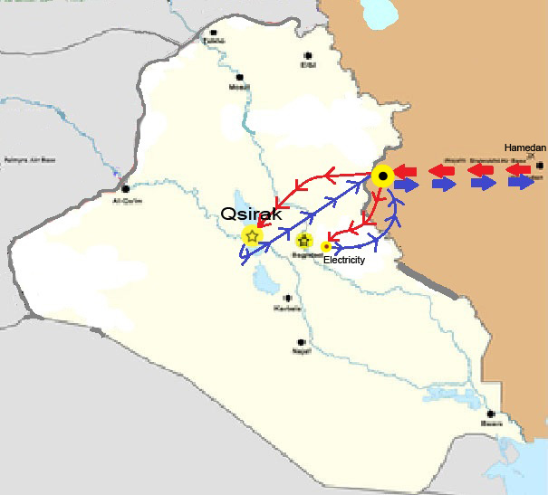 نقشه ی عملیات اوسیرک(شمشیر سوزان)